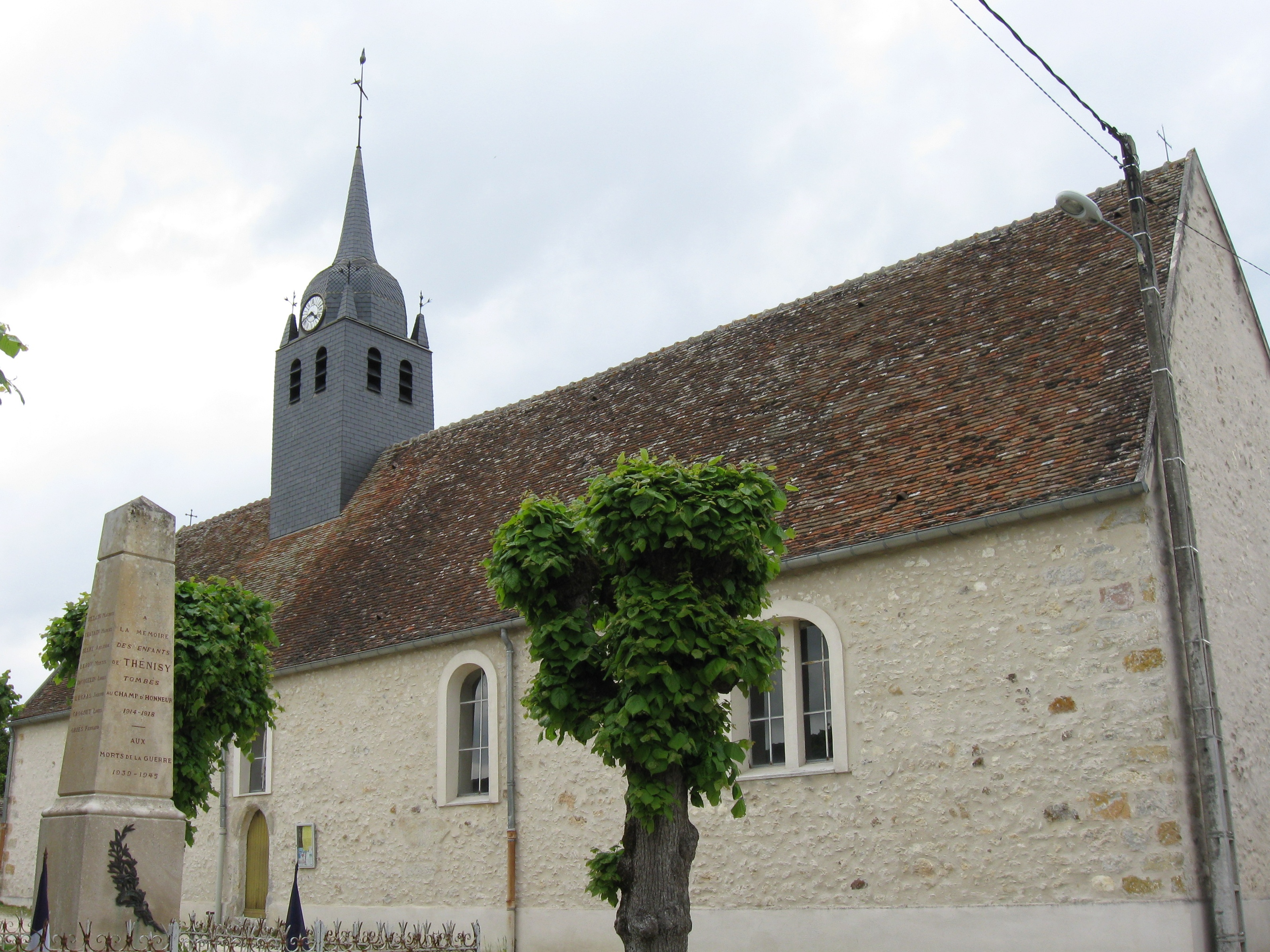 Église de la Sainte Trinité de Thénisy. (Seine-et-Marne, région Île-de-France).